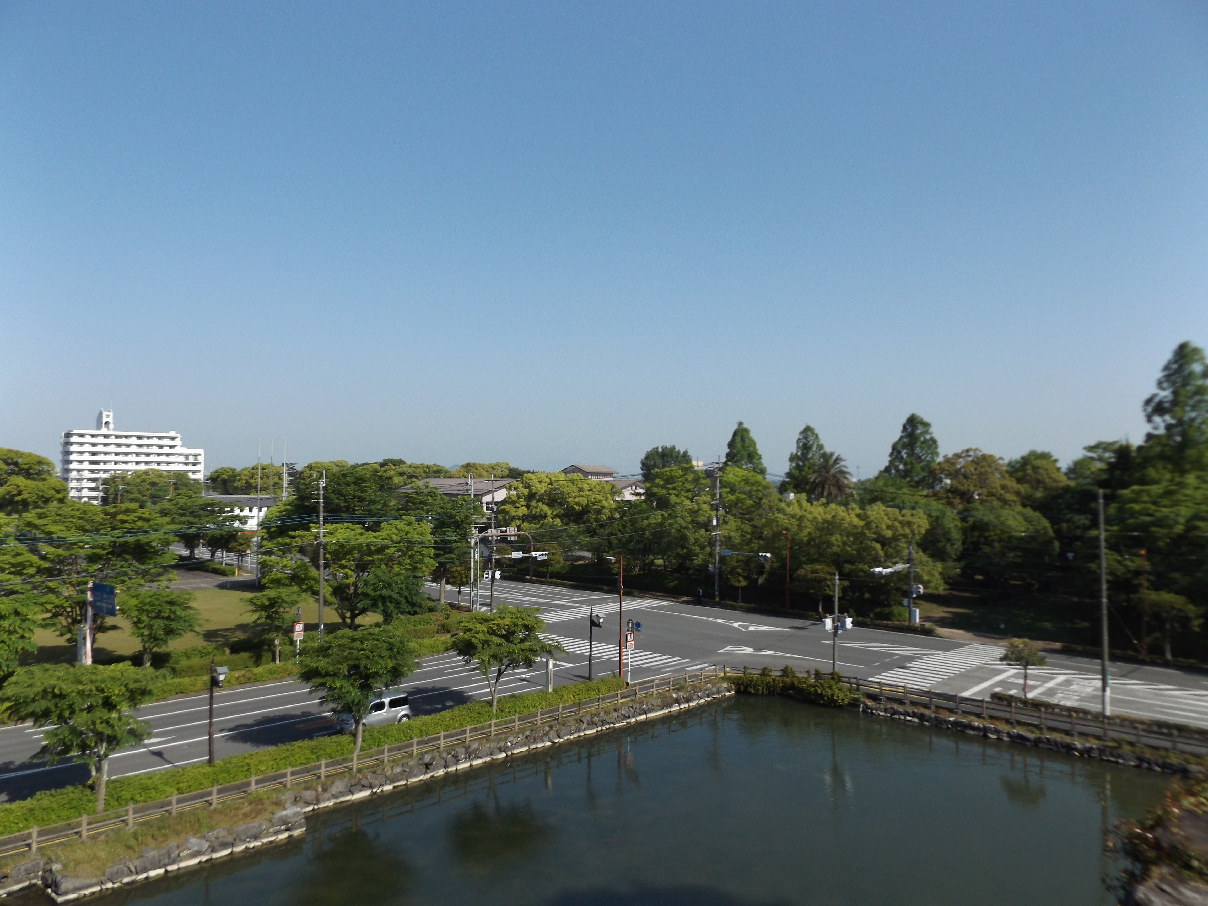 熊本県八代市の松江城町交差点。 南からの熊本県道42号八代鏡線と東からの熊本県道250号八代港大手町線が交差し、西へ延びる道は両者の重複区間。